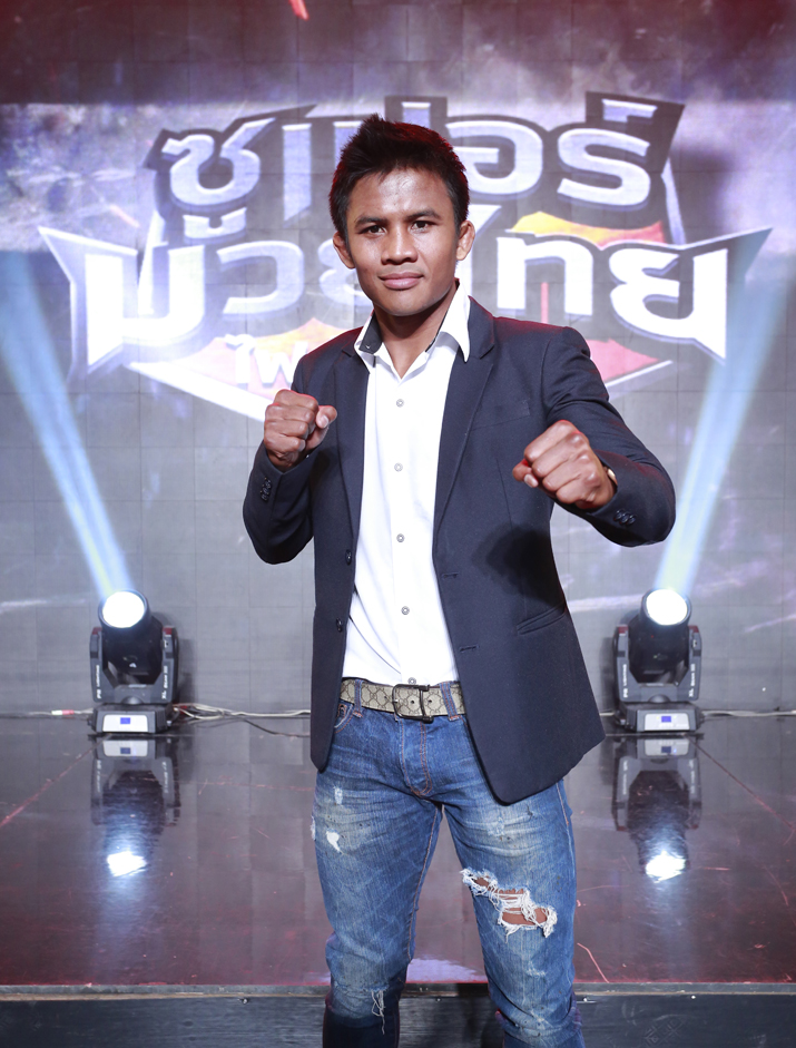 บัวขาว บัญชาเมฆ